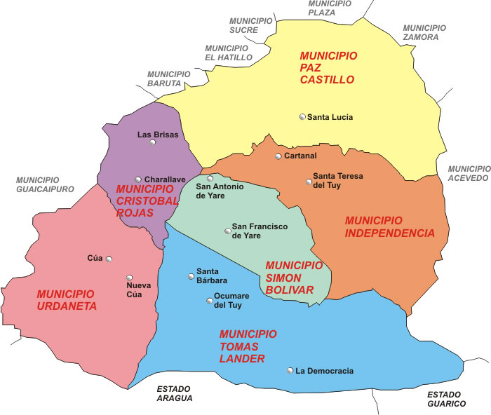 Mapa de los Municipios que conforman los Valles del Tuy